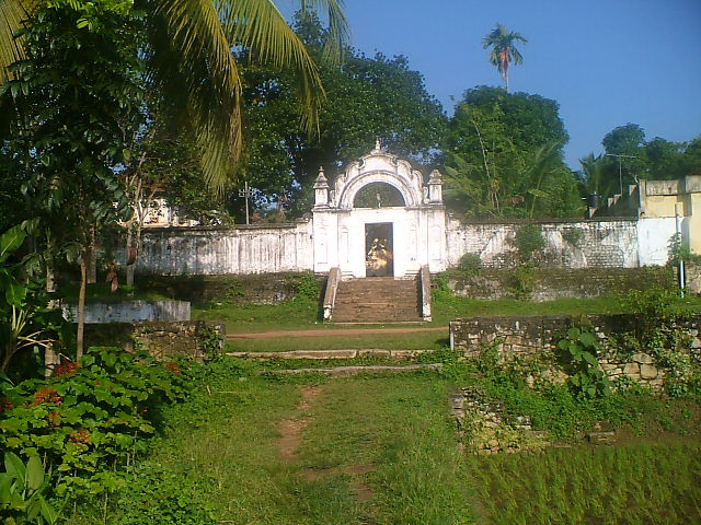 കിളിമാന്നൂർ കൊട്ടാരത്തിന്റെ പ്രവേശന കവാടം